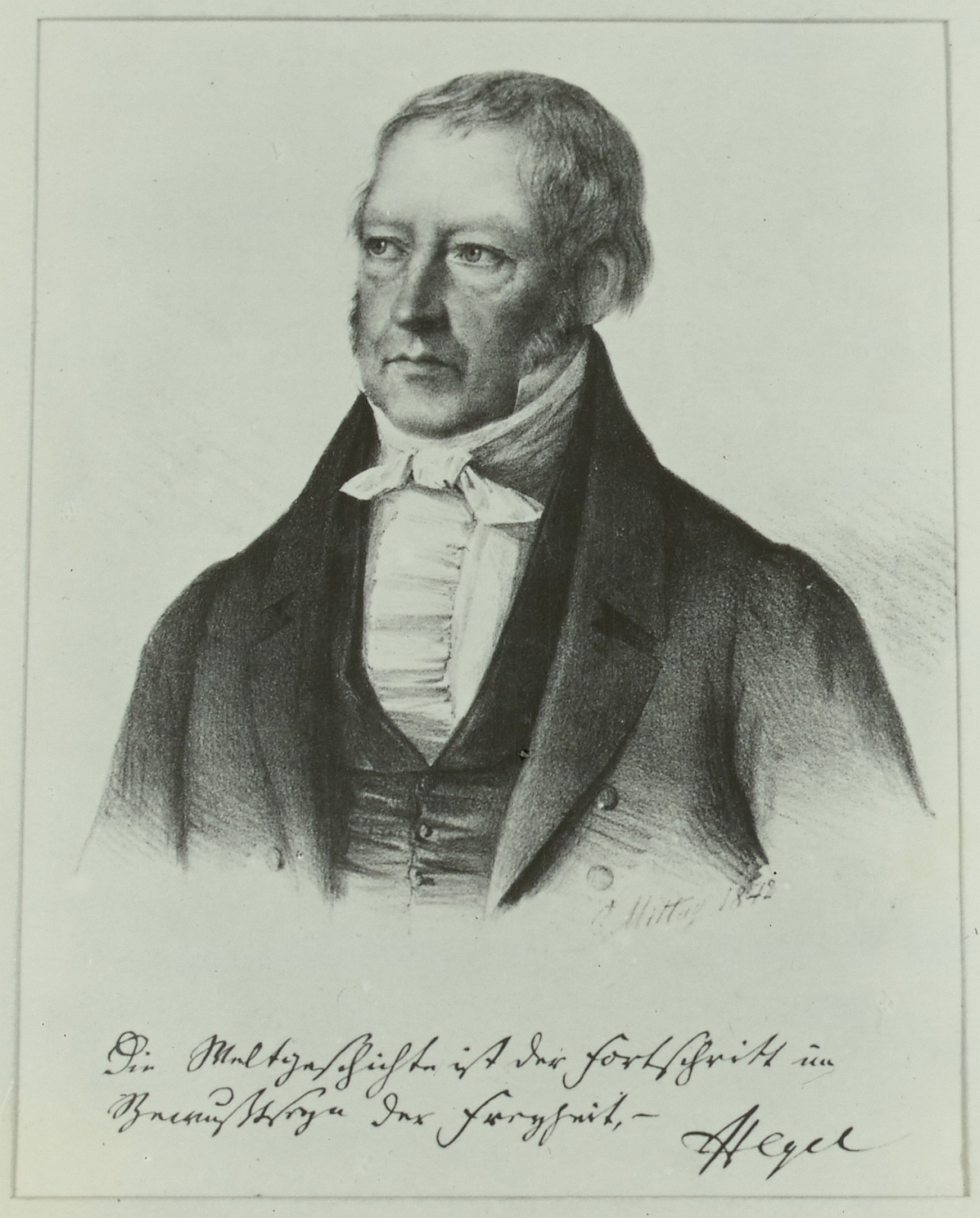 Georg Wilhelm Friedrich Hegel